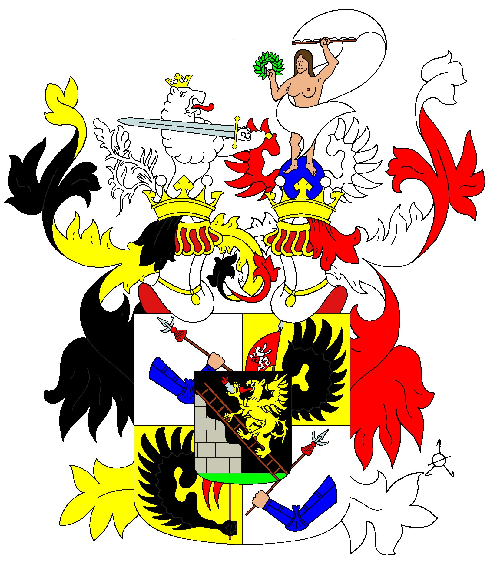 Das Wappen der Kauffer von Sturmwehr (von Michal Fiala)